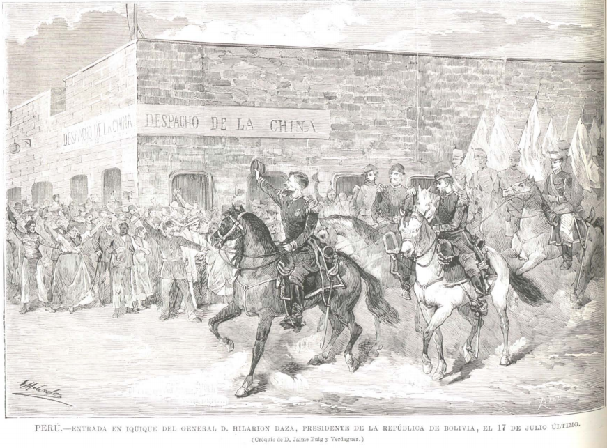 Hilarion daza llega a Iquique en 1879